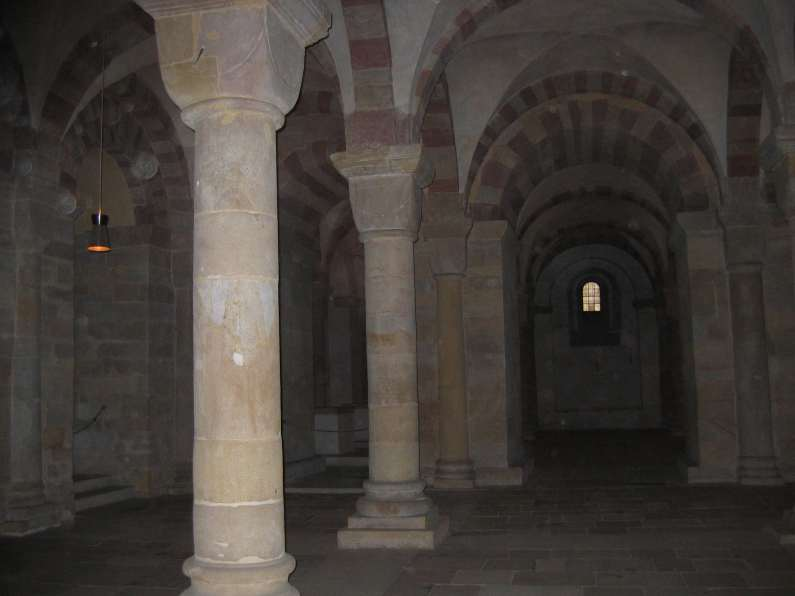 Speyerer Dom, Krypta Fotografiert von Mussklprozz am de:22. Mai de:2004 GNU-FDL Kategorie:Säule